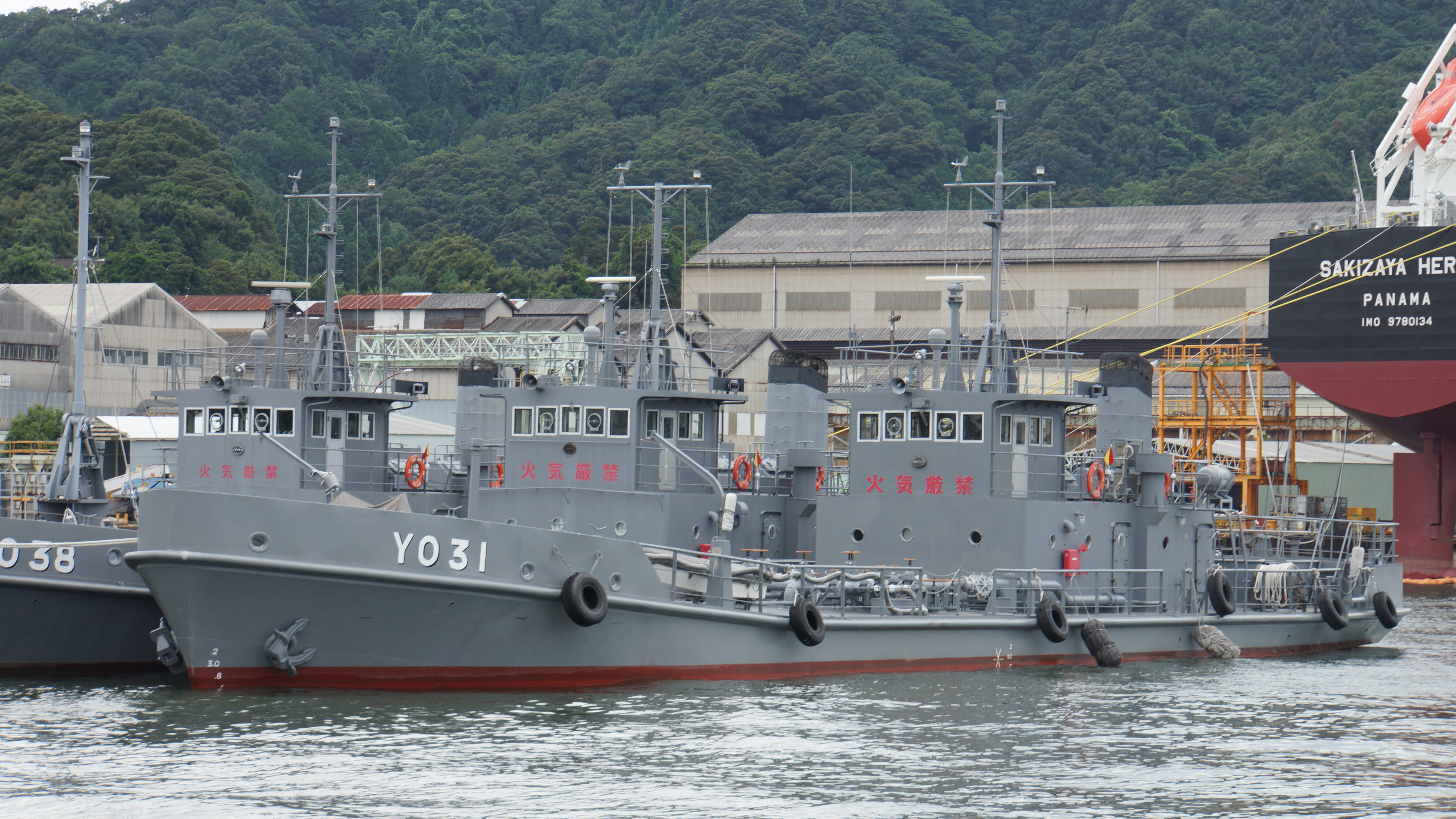 海上自衛隊 油船31号（YO-31）。2016年7月16日 舞鶴基地にて。